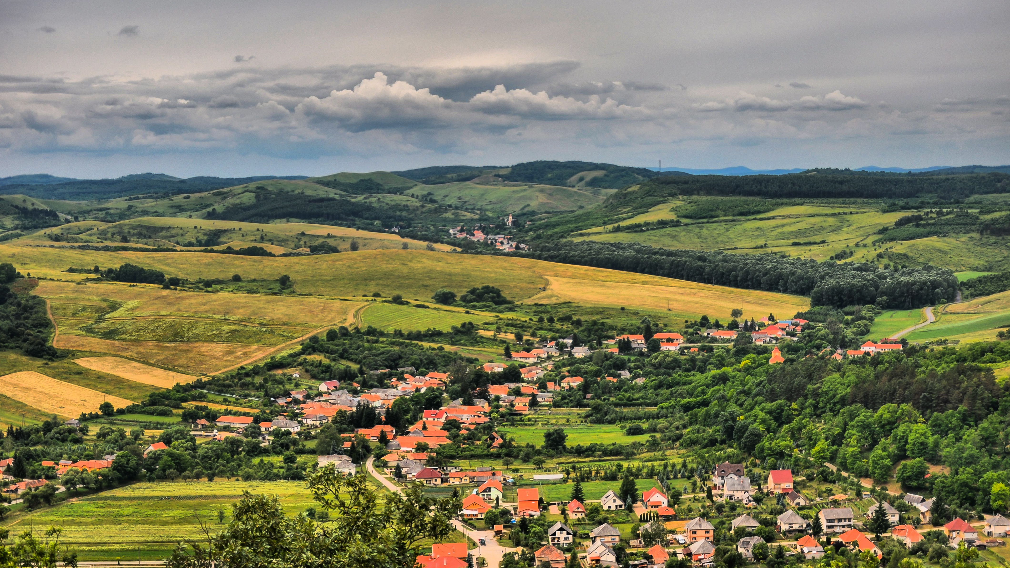 Uppony - Borsodbóta